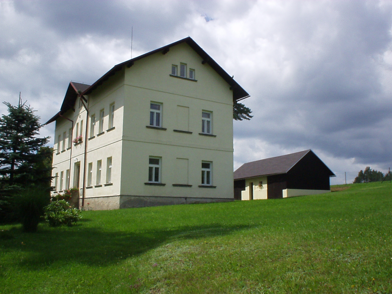 Letařovice - bývalá škola (boční pohled)